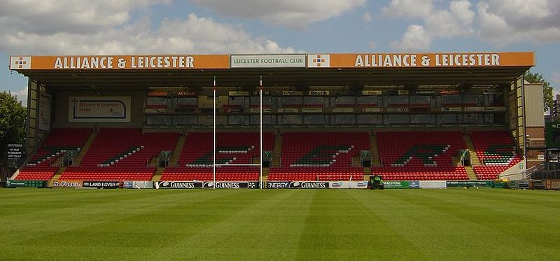 Stade des Tigres de Leiceste à Leicester en Angleterre.